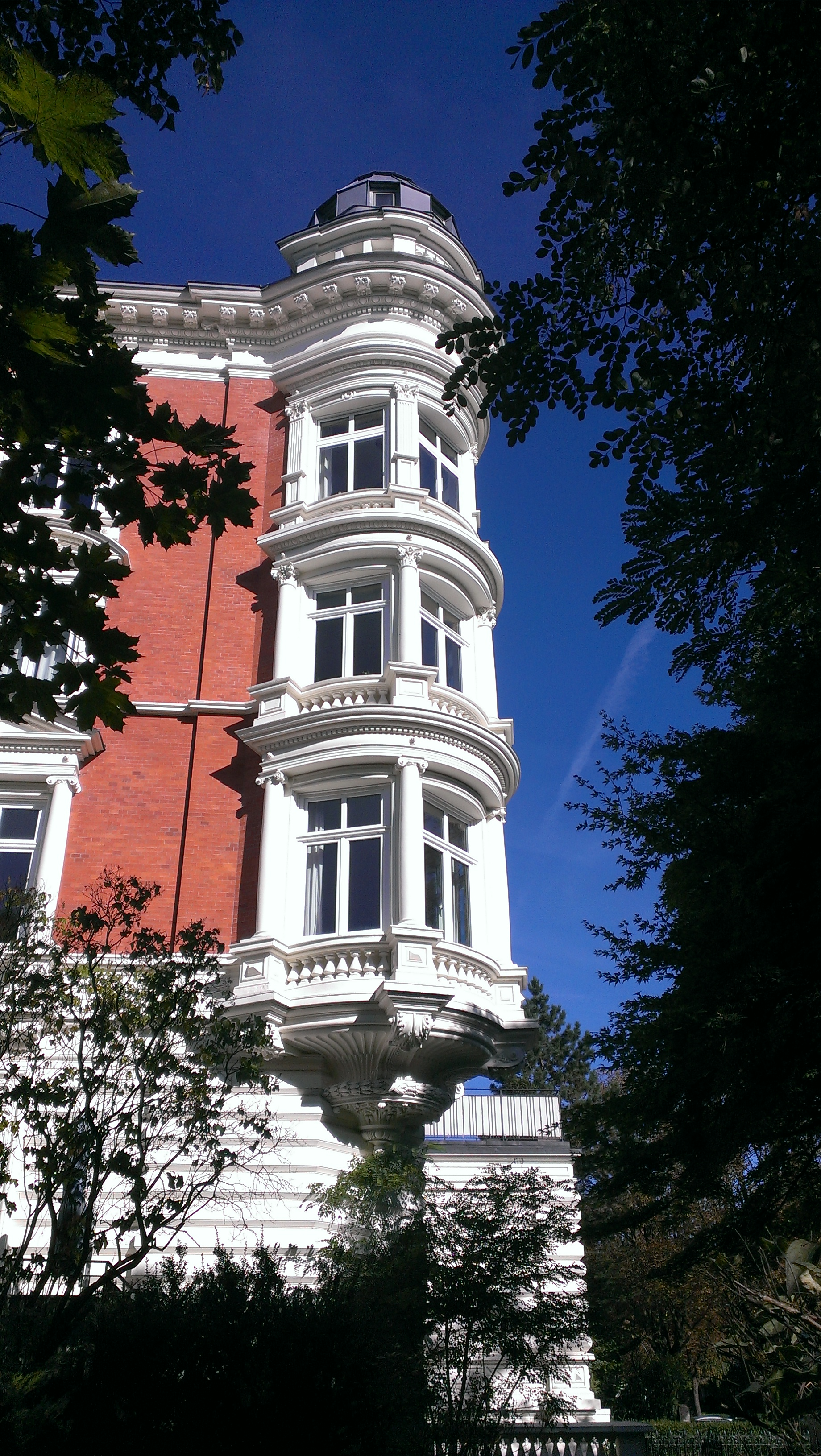 Parkallee 1, Hallerstraße 47 ErkerThis is a photograph of an architectural monument.